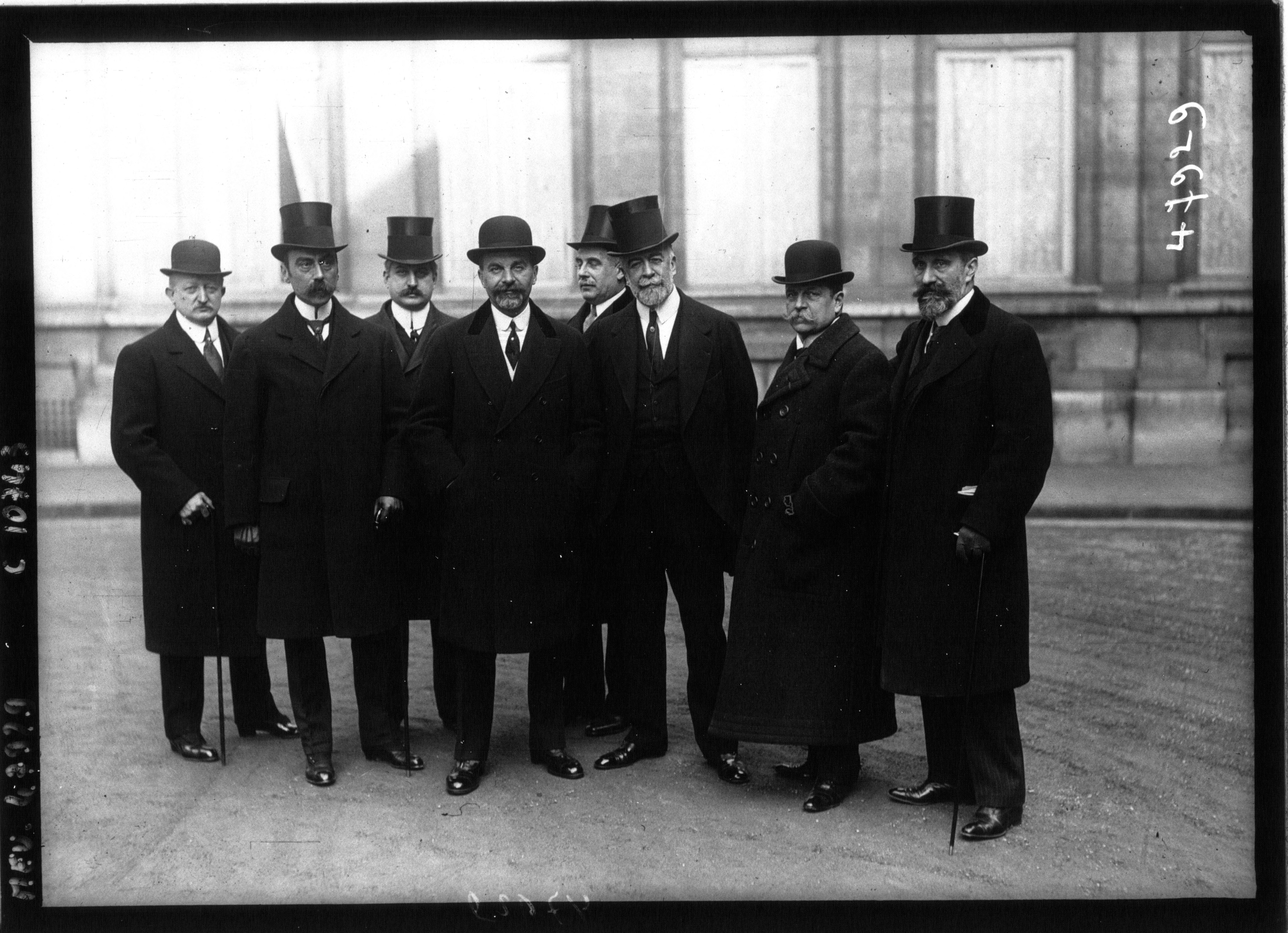 La commission sportive de l'ACF au ministère de l'Intérieur : de gauche à droite : MM. Longuenau, Deydier, Koechlin.